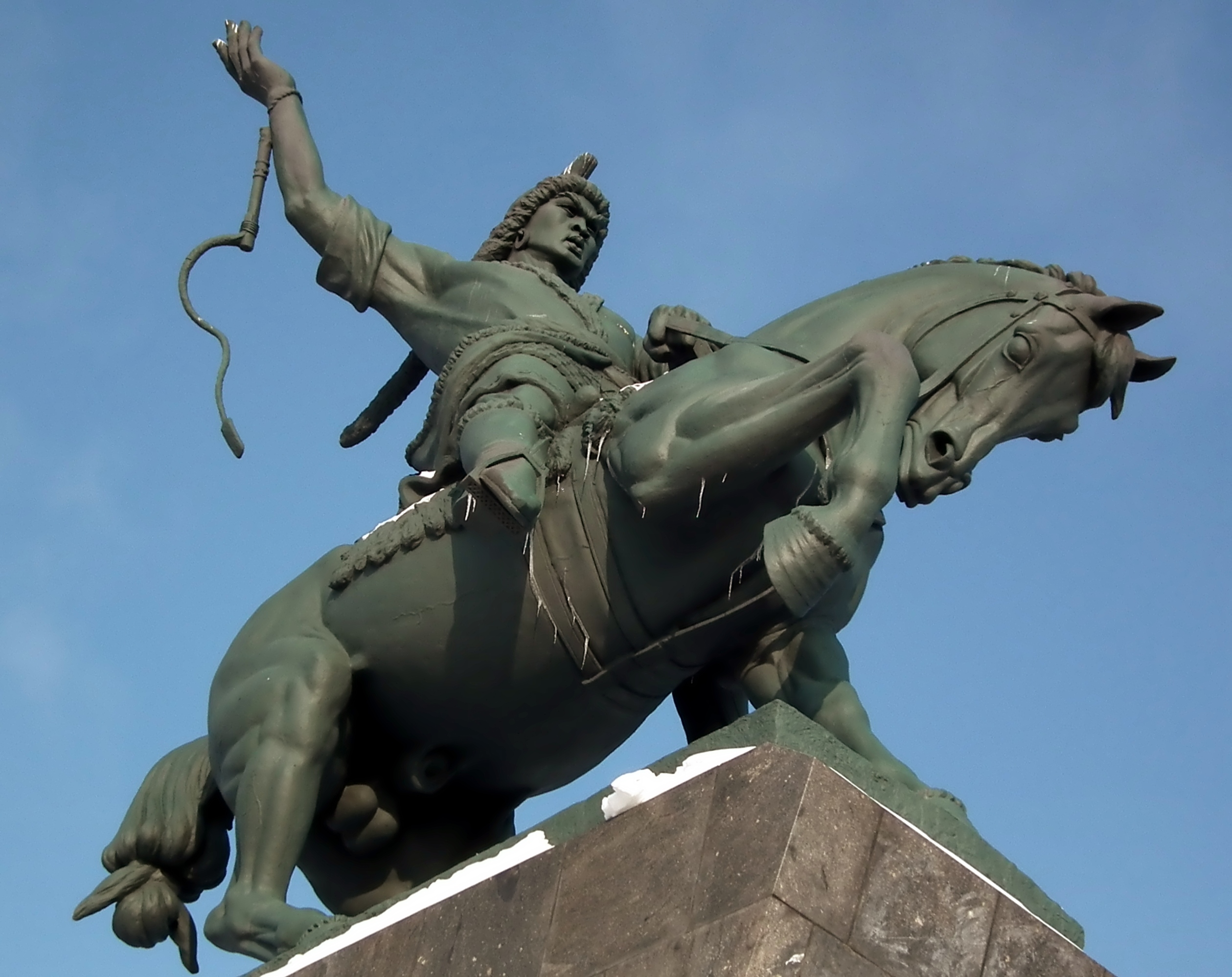 На Москву !!!